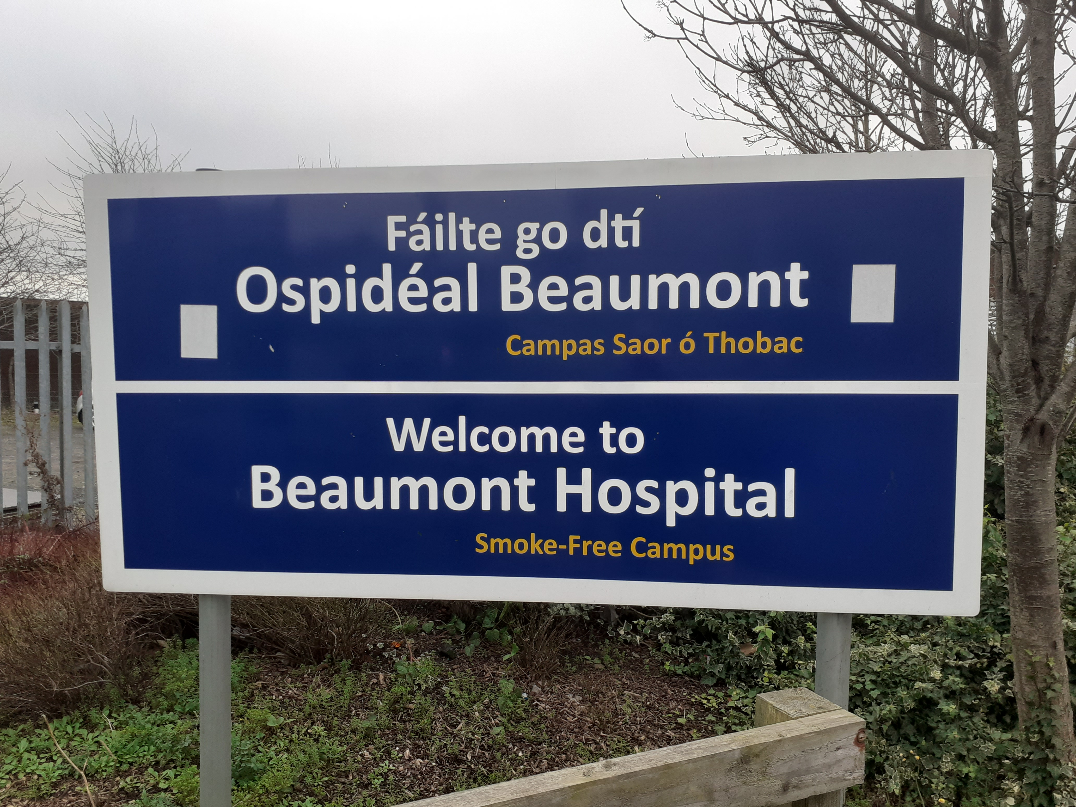 Comhartha fáilithe go dtí Ospidéal Beaumont.